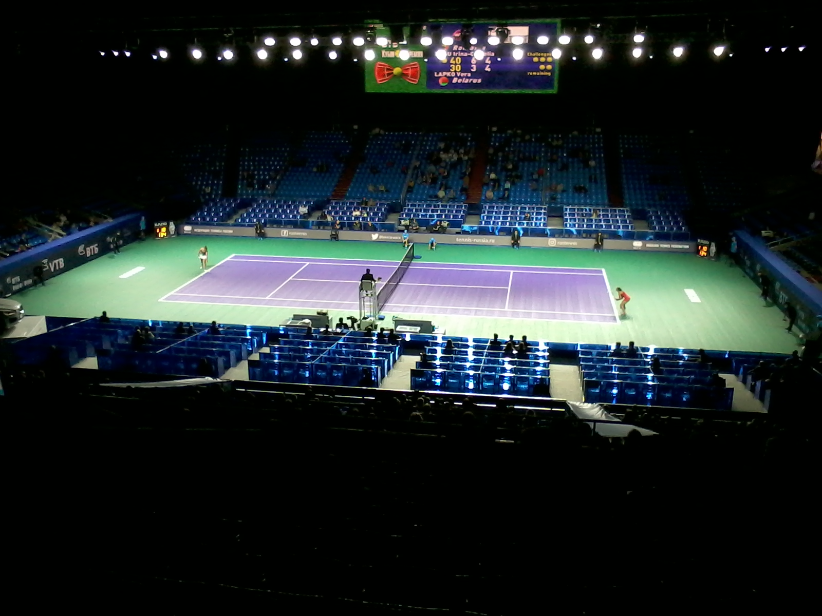 Четвертьфинальный матч Кубка Кремля 2017 женского одиночного разряда между Ириной-Камелией Бегу и Верой Лапко